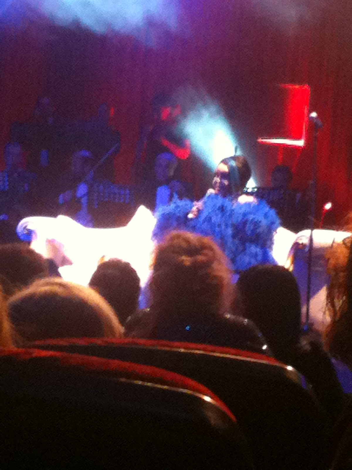 Adnan Şenses, Bülent Ersoy, Muazzez Abacı üçlüsü tarafından Bostancı Kültür Merkezi'nde düzenlenen Klasik Türk Müziği konserinde Bülent Ersoy sahne performansıyla, 2012.